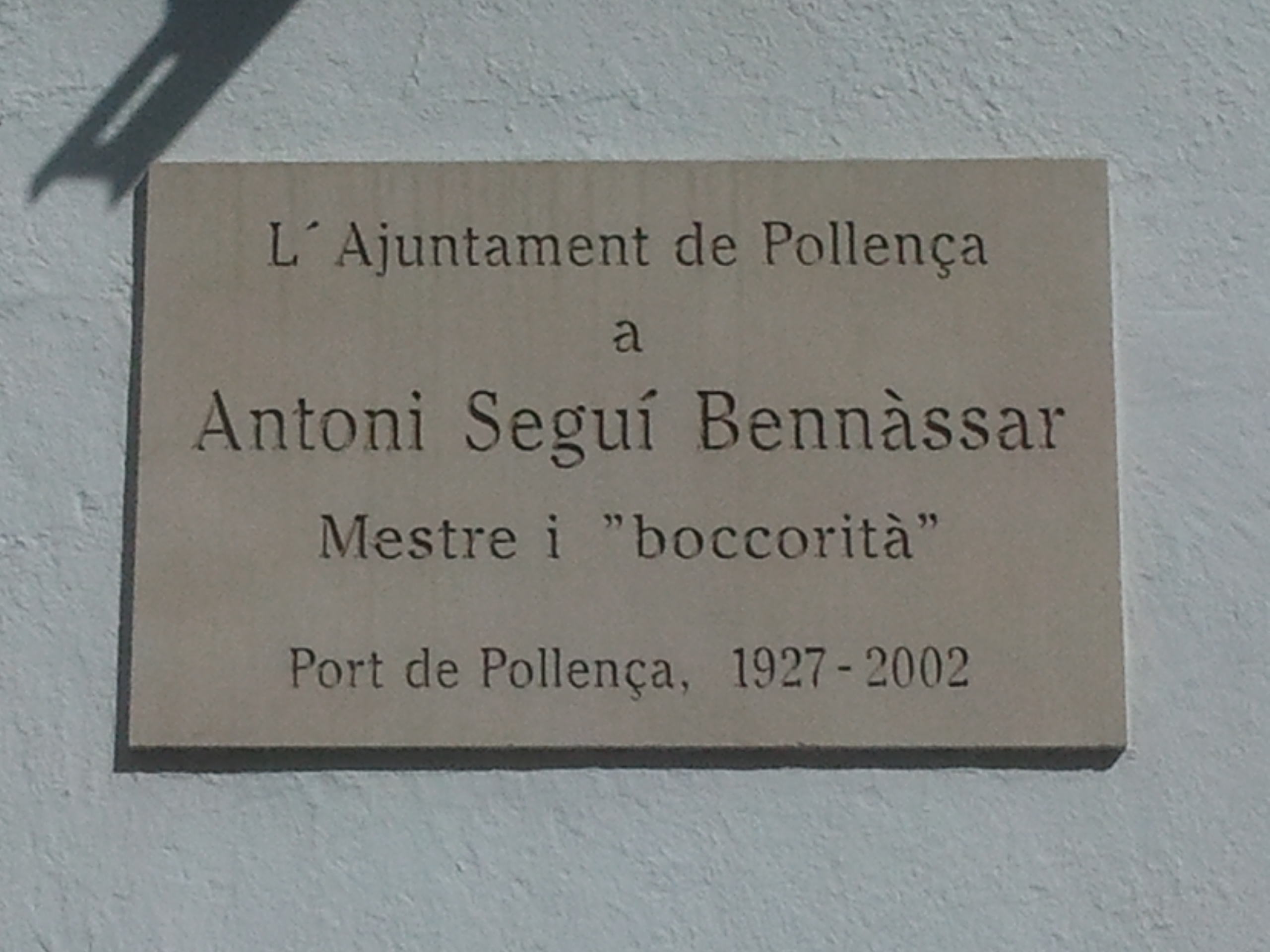 Placa commemorativa Antoni Seguí Bennàssar, carrer Formentor nº2 de Port de Pollença, Mallorca, Illes Balears.